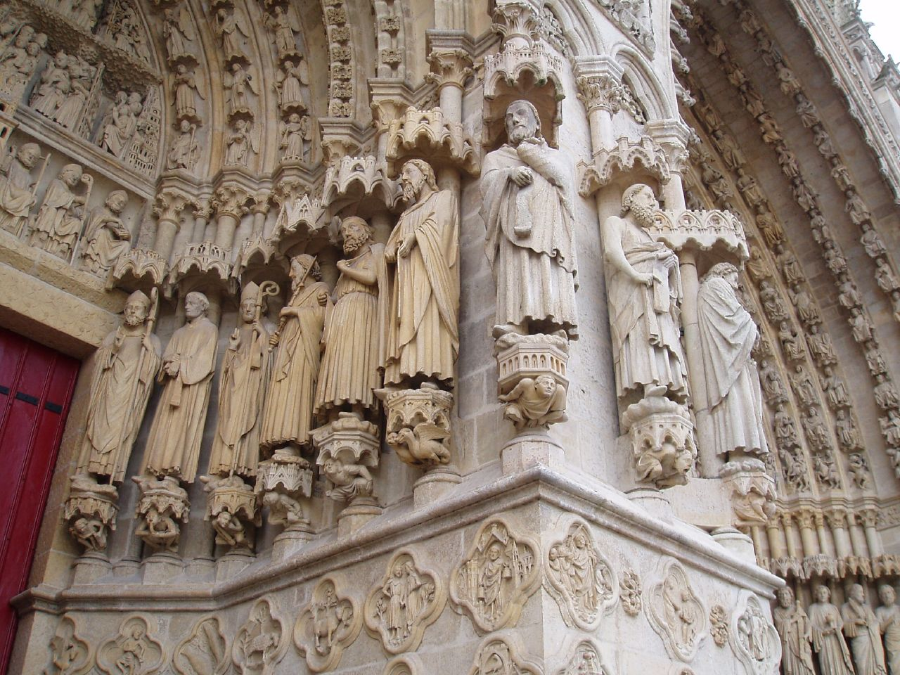 Amiens (Somme, France)